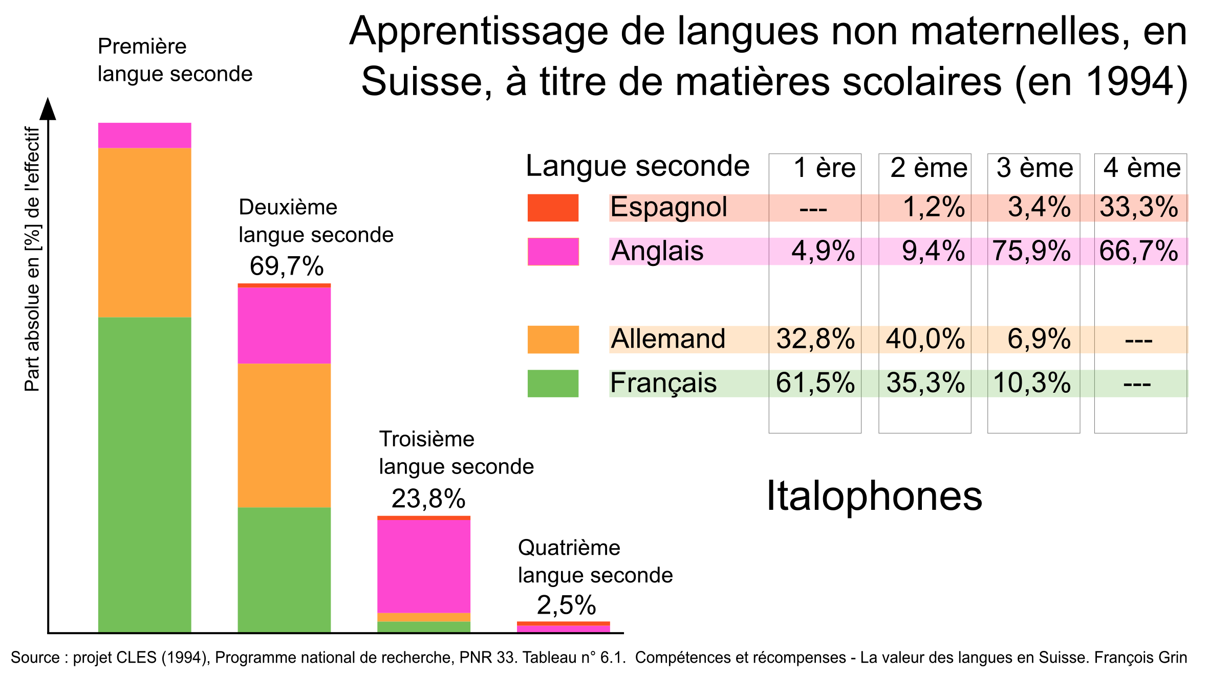 Apprentissage de langues non maternelles, en Suisse, à titre de matières scolaires (en 1994). Pour les italophones. Graphique réalisé sur la base du tableau n° 6.1, p. 107 du livre Compétences et récompenses - La valeur des langues en Suisse de François Grin, Éditions universitaires Fribourg, Suisse, 1999 (ISBN 2-8271-0843-7)